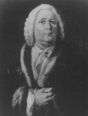 Wilhelm Jeremias Müller war ein deutscher Architekt, der das alte Stadtbild Karlsruhes maßgeblich gestaltete.